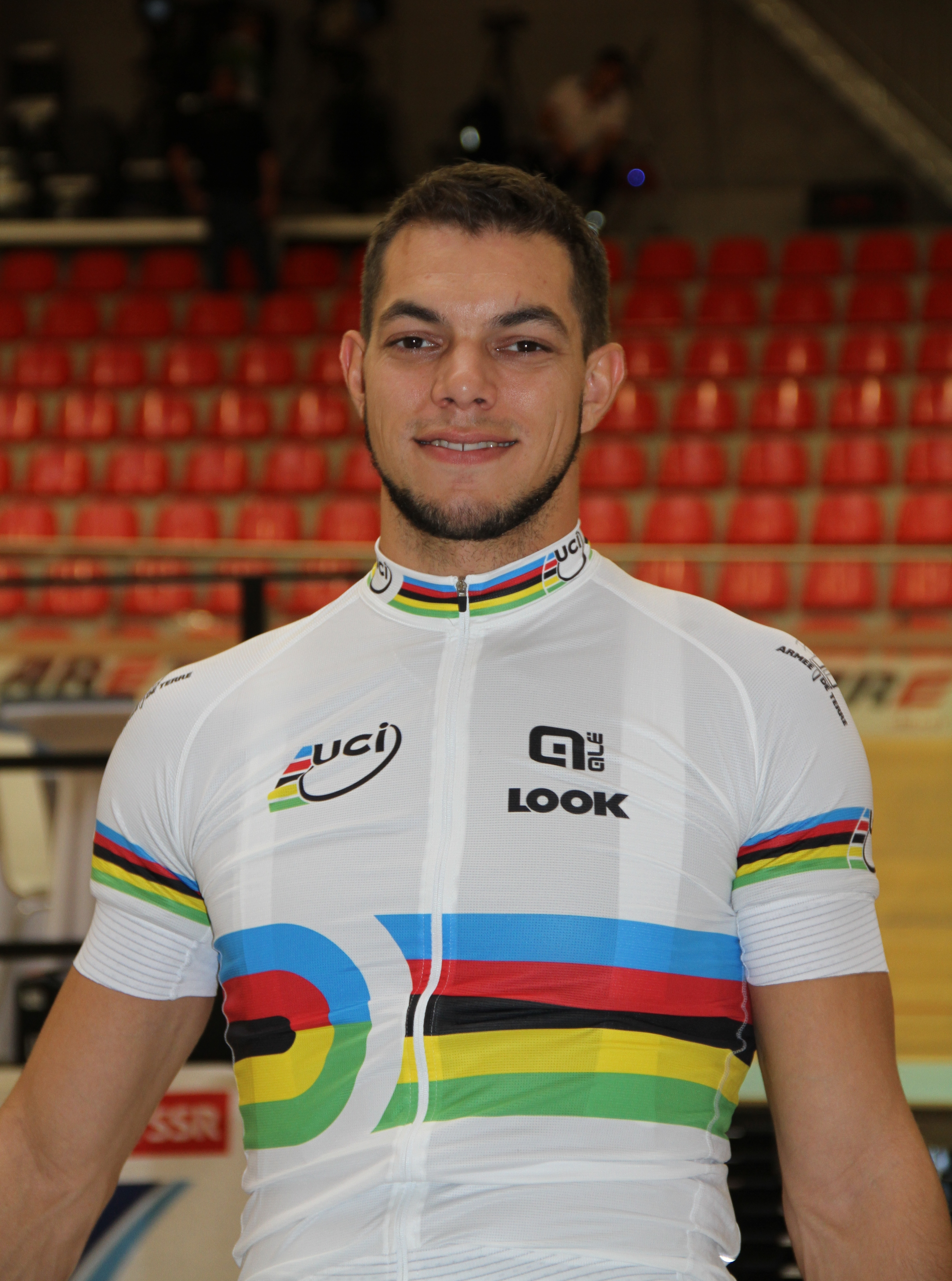 Kévin Sireau, französischer Radsportler The making of this document was supported by the Community-Budget of Wikimedia Germany.